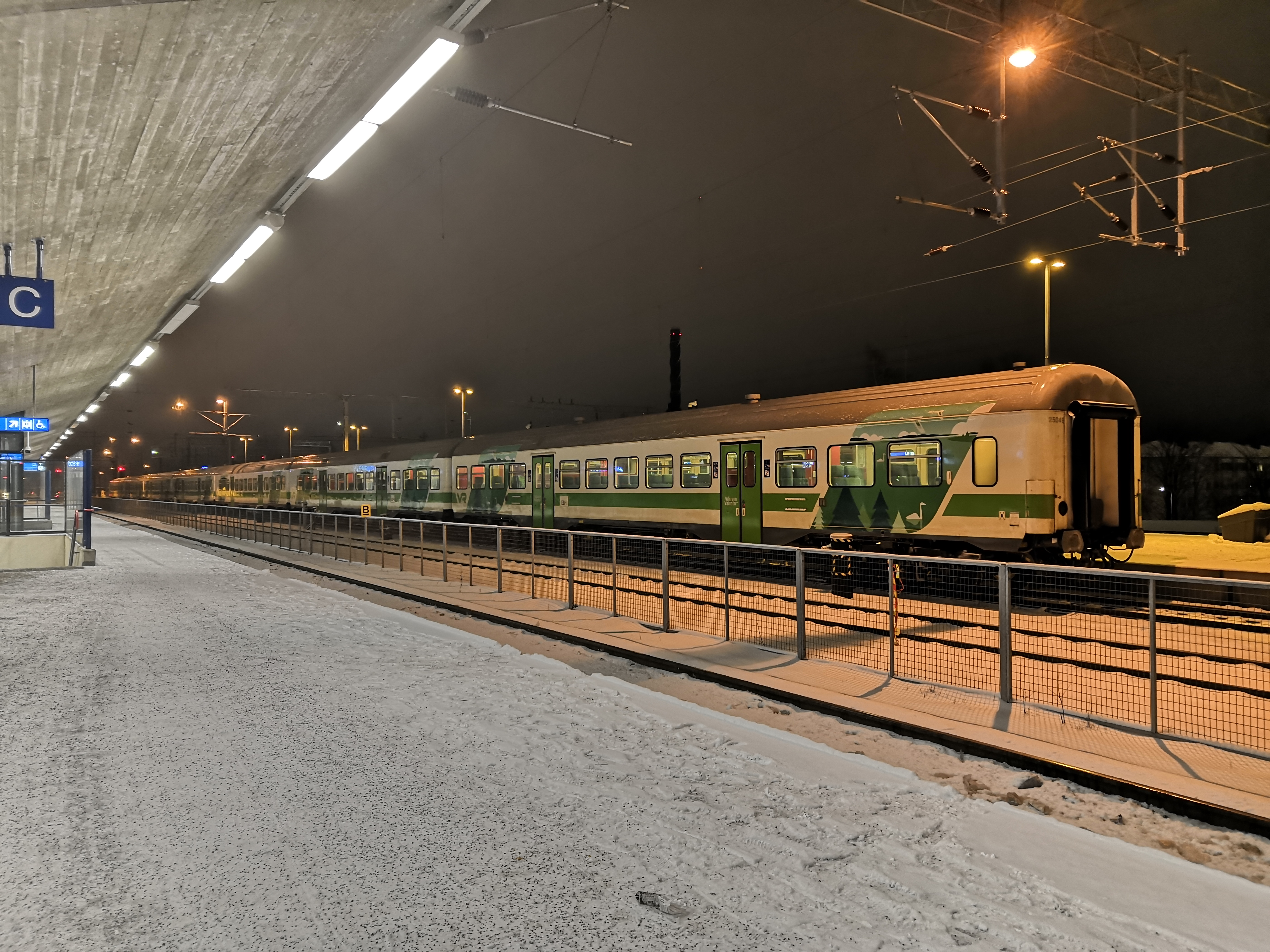 Eil-juna Kouvolan asemalla